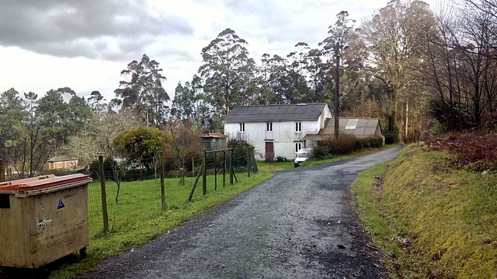 Vista da Costeira, Pedroso, Narón.